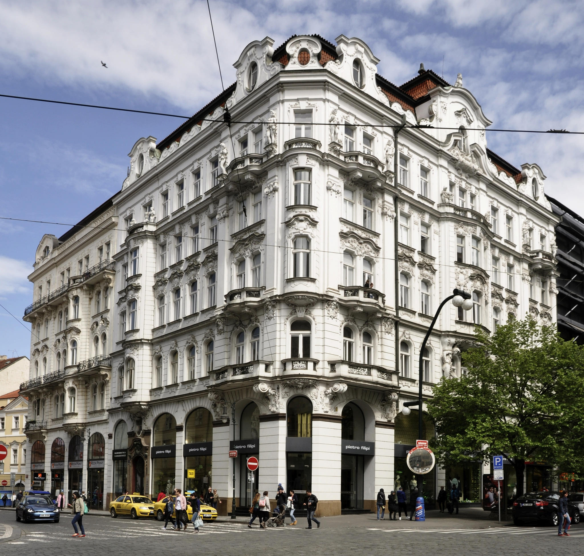 Secesní bytový nájemní a obchodní dům v Praze